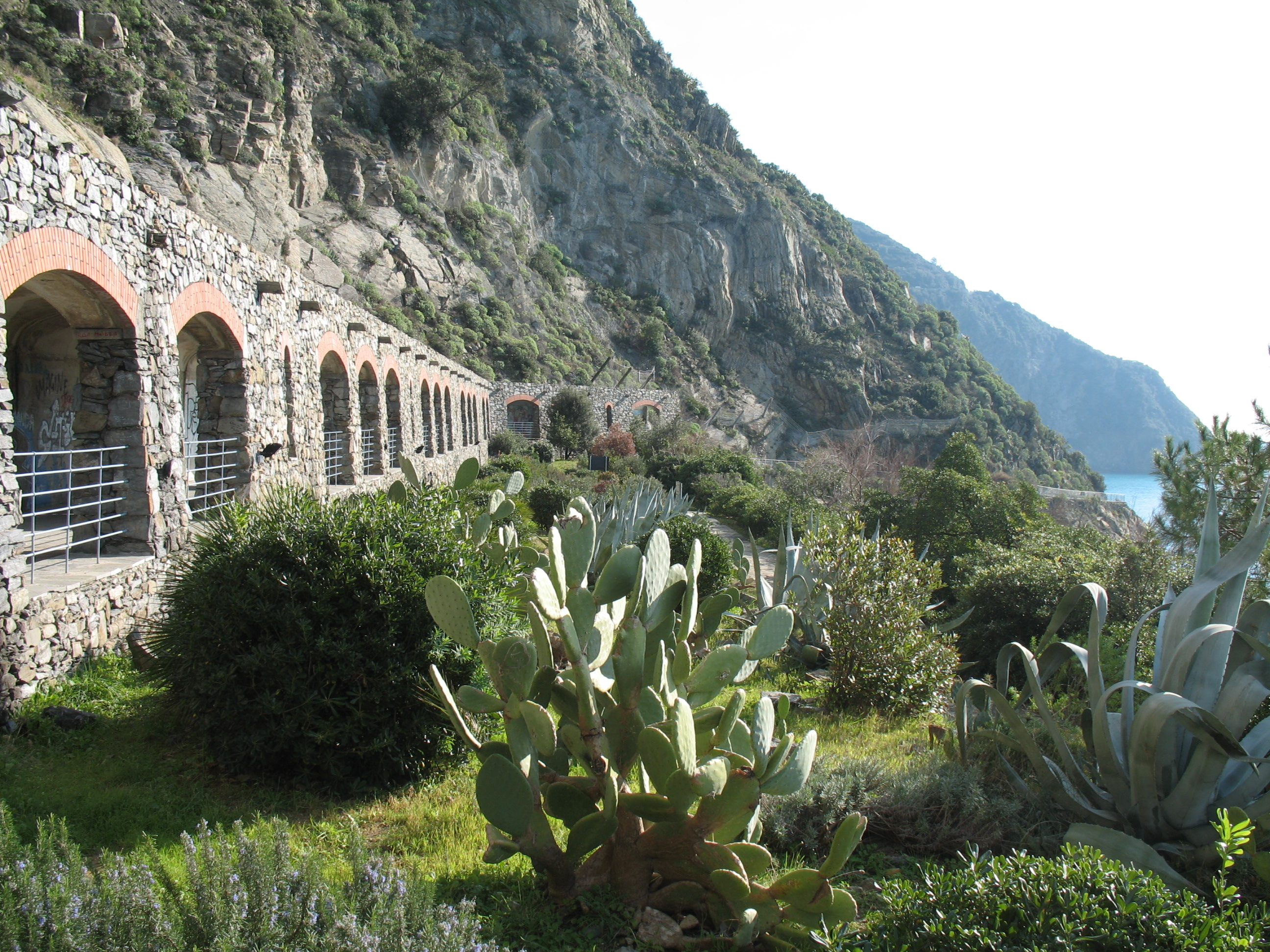 Immagine dalle Cinque Terre Via dell'Amore